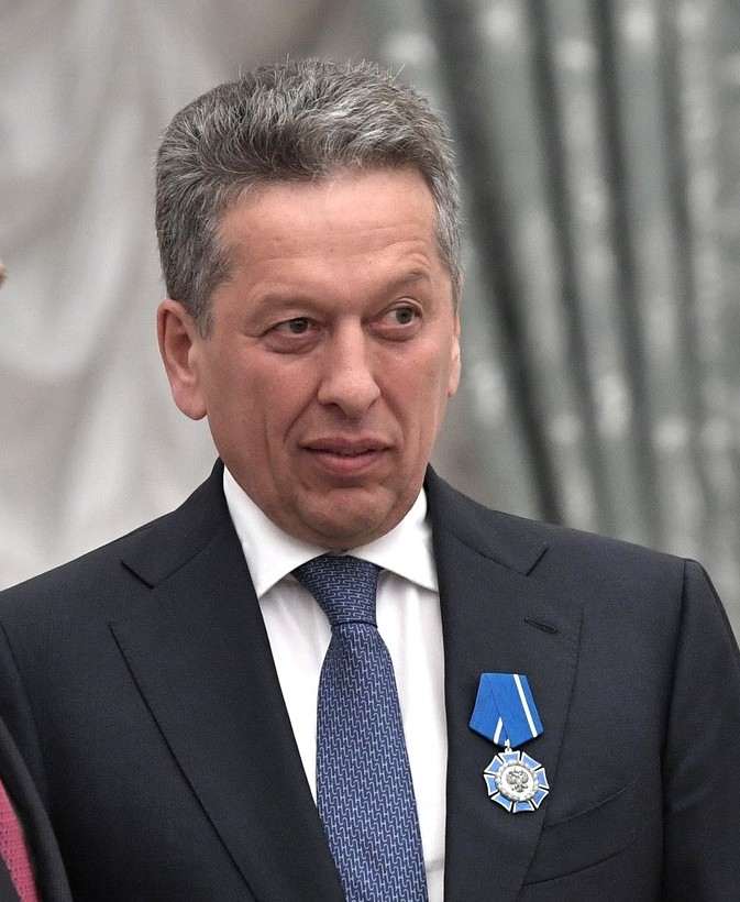 Орденом Почёта награждён генеральный директор ПАО «Татнефть» имени В.Д.Шашина Наиль Маганов